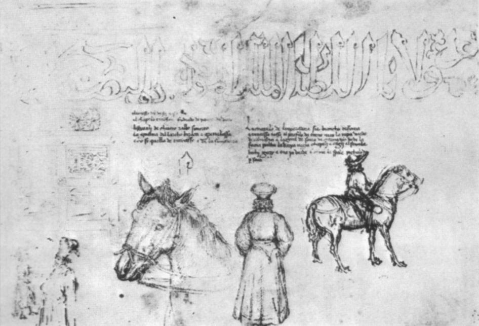 Pisanello, disegni, louvre 1062r.jpg